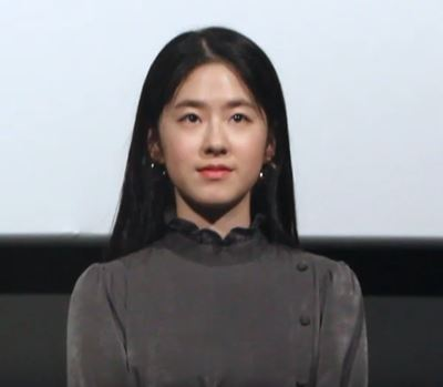 19일 오후 서울시 용산구 CGV용산아이크파크몰에서 영화 '스윙키즈'의 무대인사 행사가 열려, 강형철 감독, 도경수, 박혜수, 오정세 배우가 참석해 관객들에게 인사를 하고 있다.